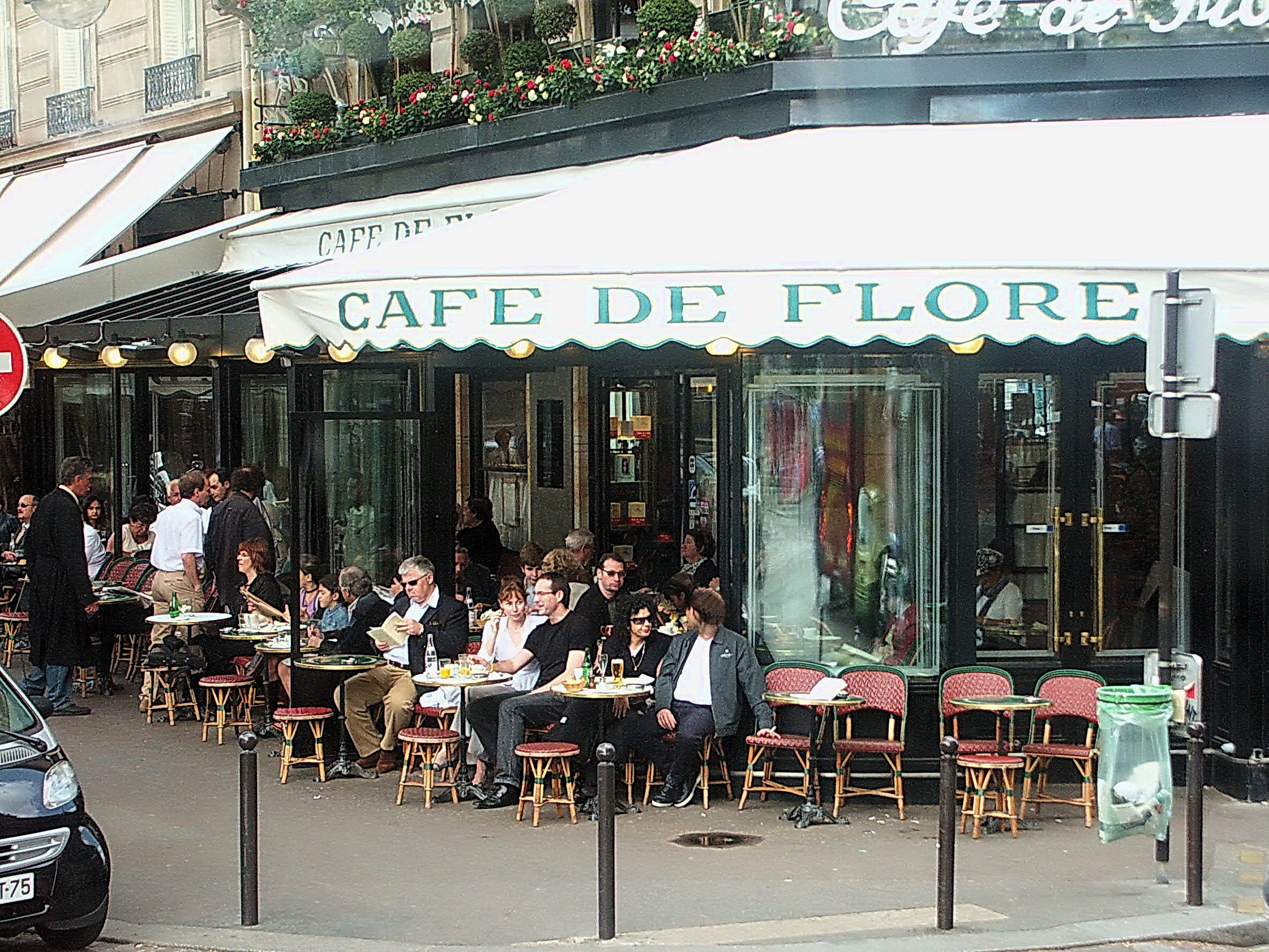 Cafe de Flore 花神咖啡